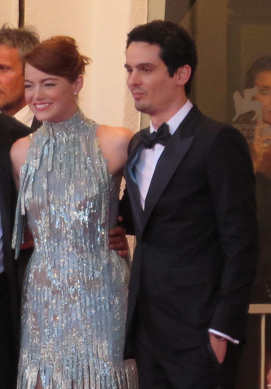 Emma Stone, Biennale di Venezia, Cinema - Film Festival